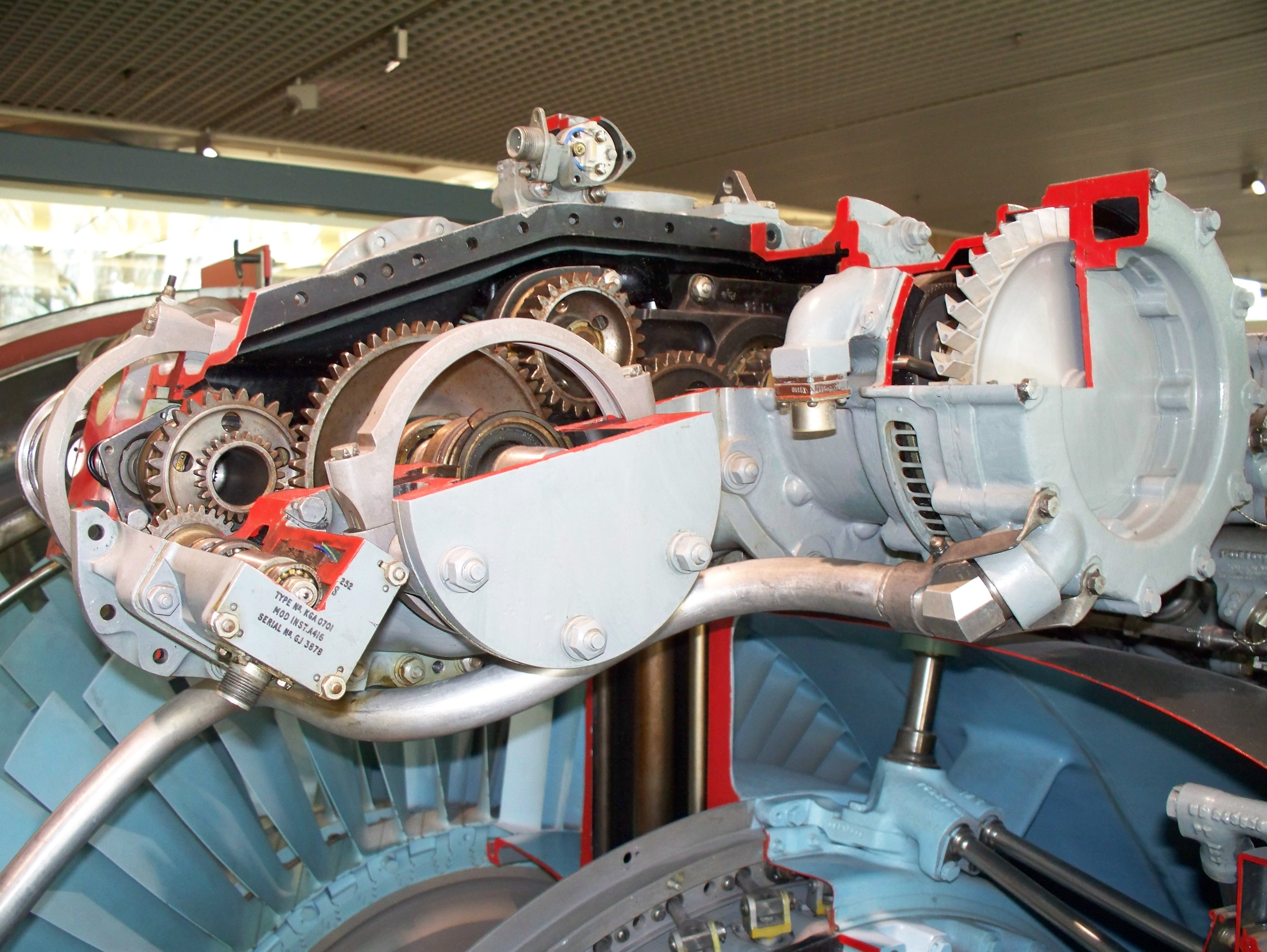 Das Triebwerk Rolls-Royce Pegasus im Deutschen Museum in München.